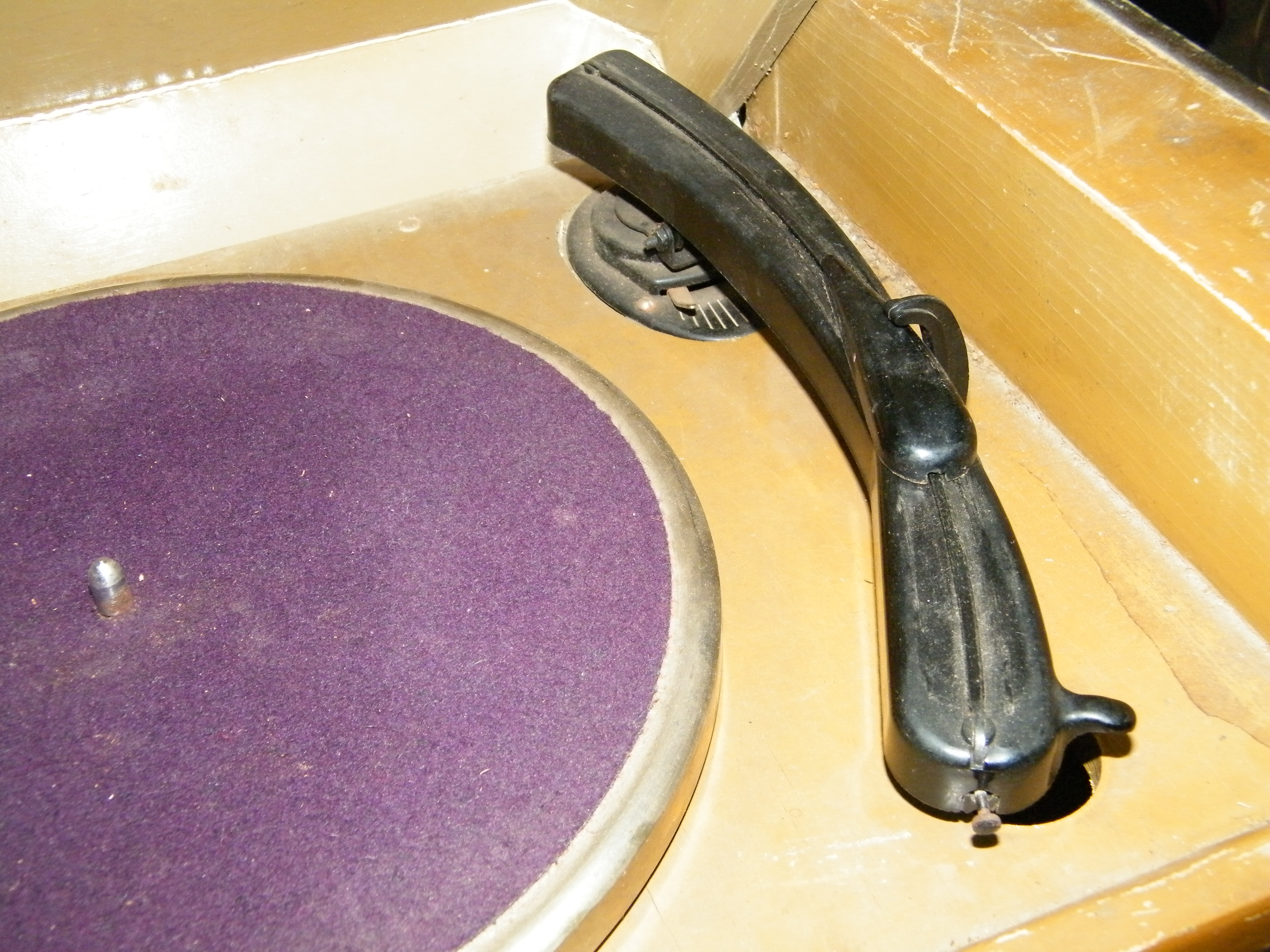 Теплый ламповый звук